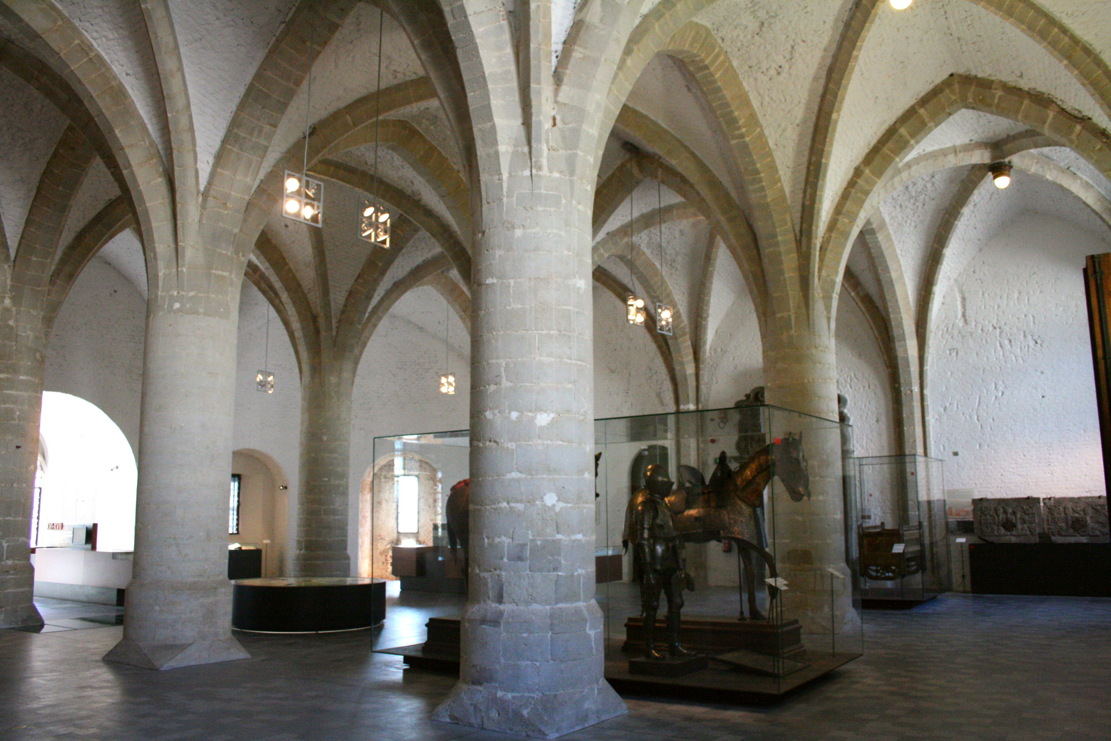 Porte Hal (deuxième enceinte), Bruxelles, Belgique. Salle Gothique